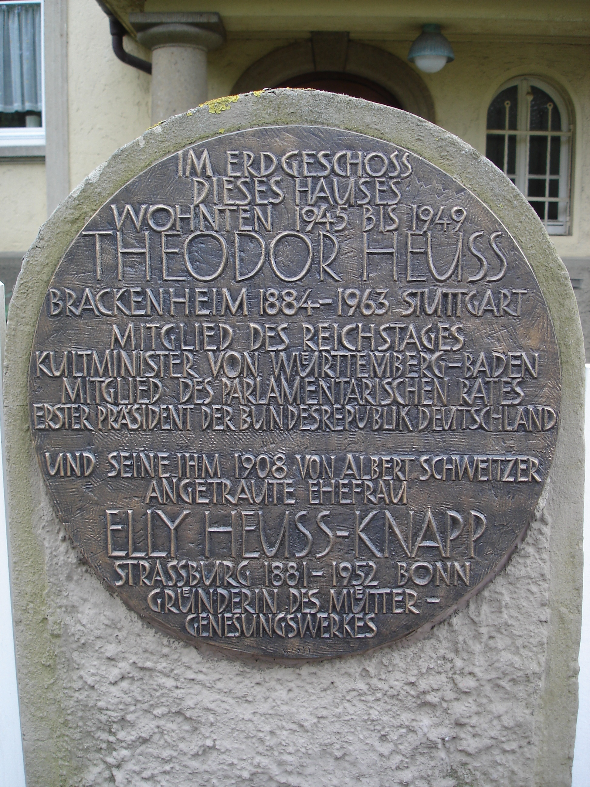 Gedenktafel für Theodor Heuss in Stuttgart-Degerloch des Bildhauers Markus Wolf (2002)